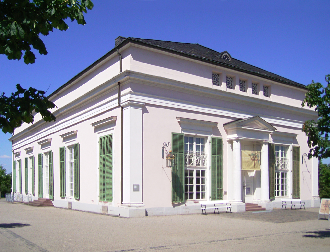 Bergpark wilhelmshoehe ballhaus Photograph: Benutzer:Hafenbar